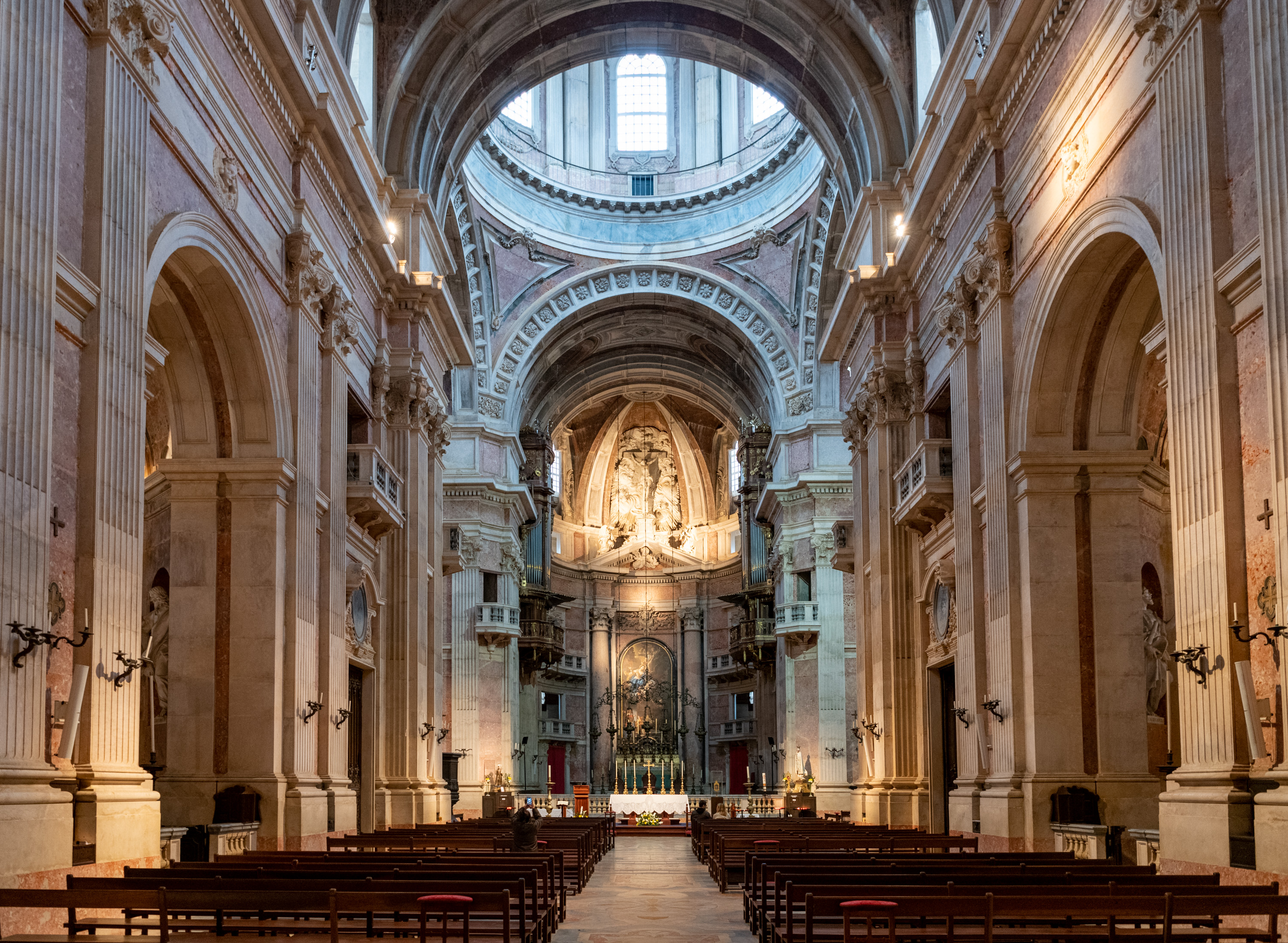 22340-Mafra